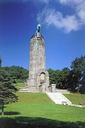 Rakouský jubilejní pomník Bitvy u Chlumce 1813